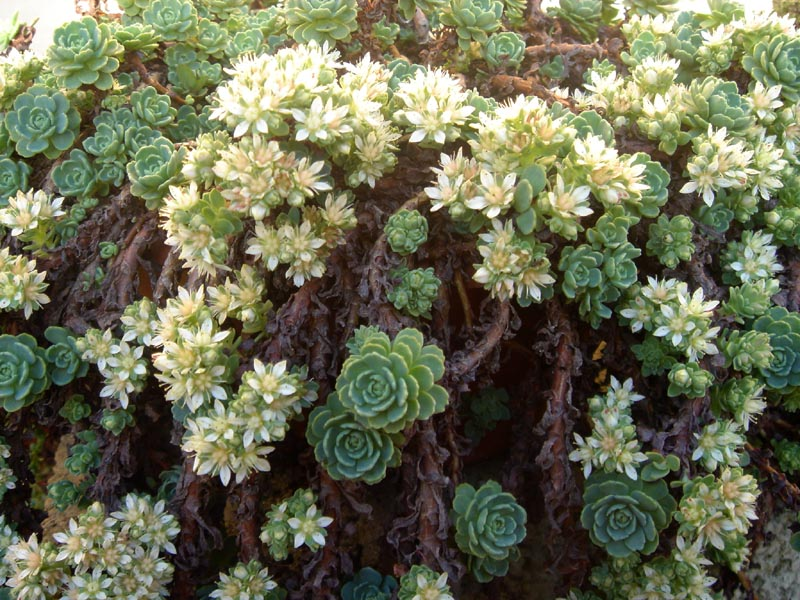 Sedum pachyclados